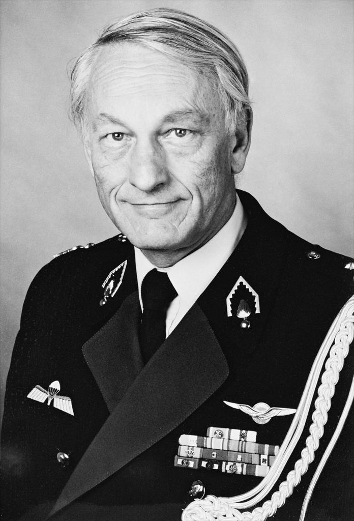 Diederik Fabius (1943-2015) was een Nederlands generaal-majoor en commandant van de Koninklijke Marechaussee.